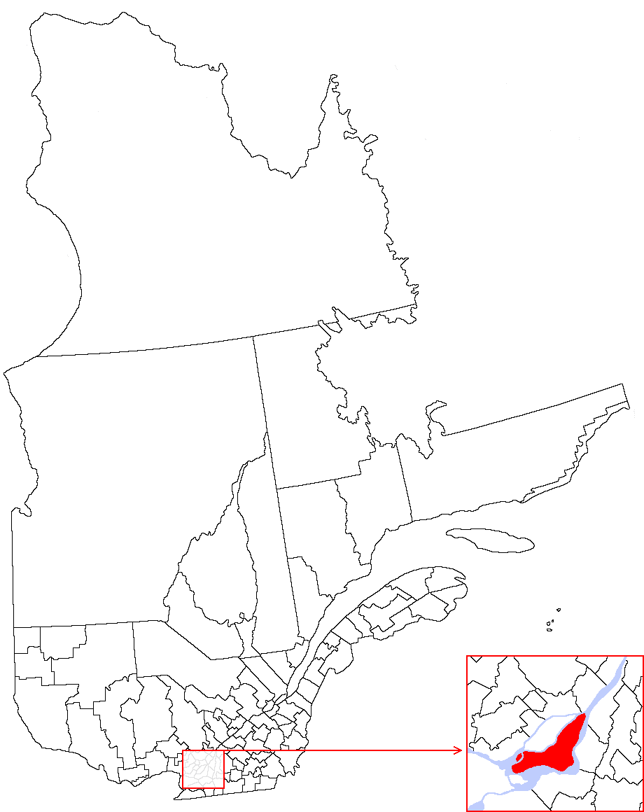 Montréal, Quebec